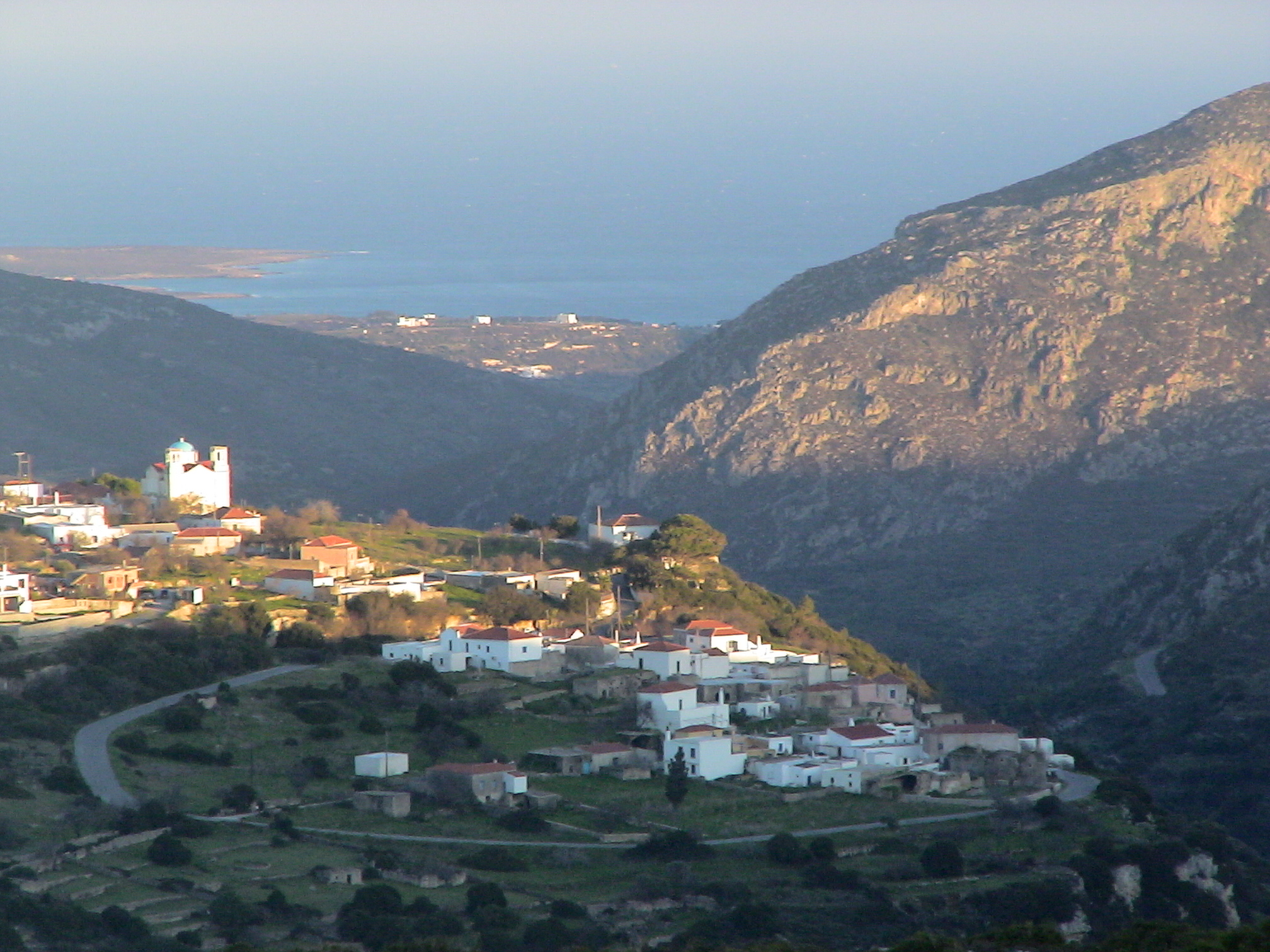 τα Μητάτα με την Παλαιόπολη στο βάθος